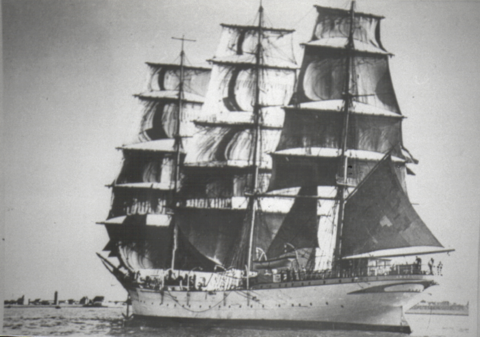 Le trois-mâts carré Grossherzogin Elisabeth (futur Duchesse Anne - Dunkerque)